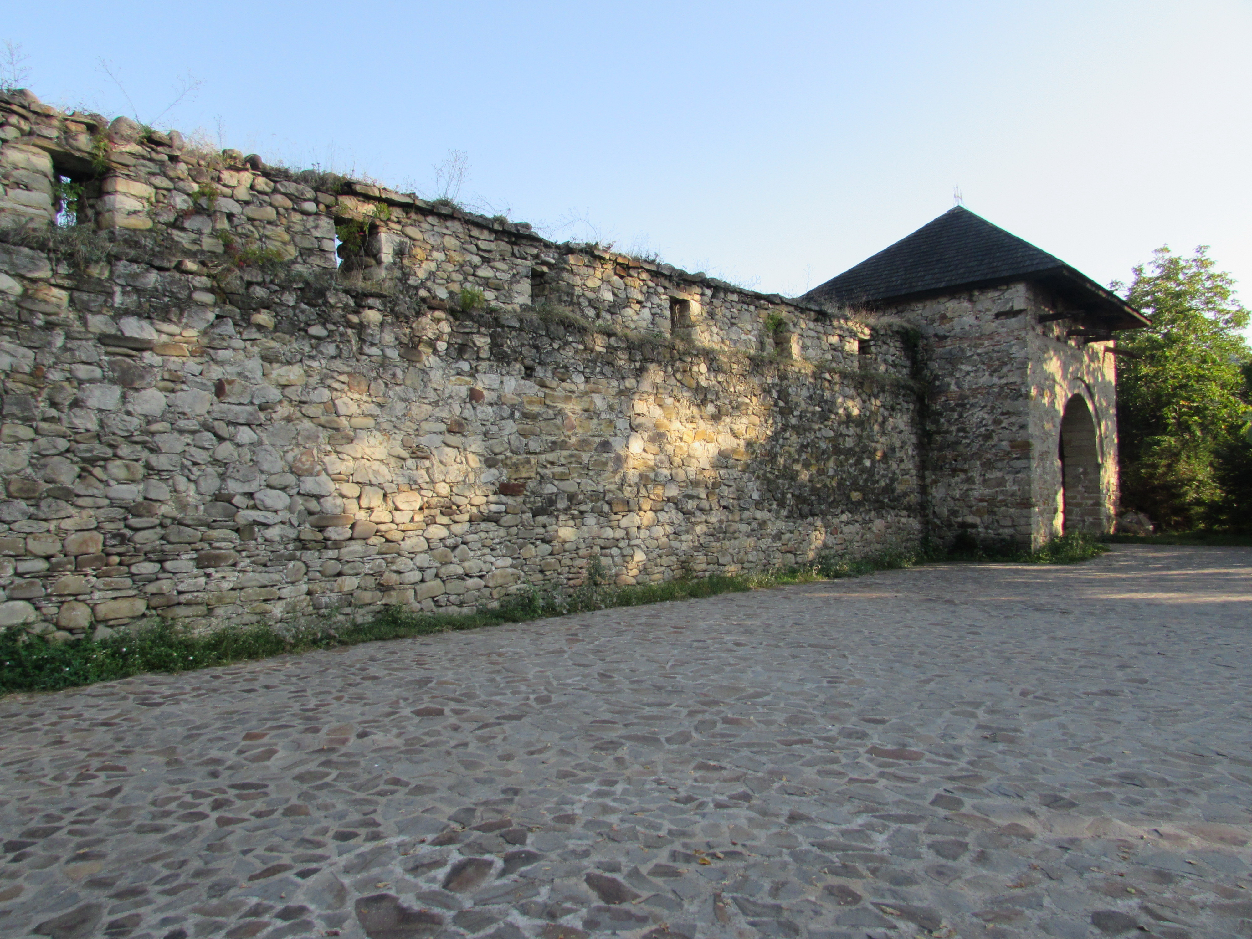 Fosta Mănăstire Răducanu din Târgu Ocna